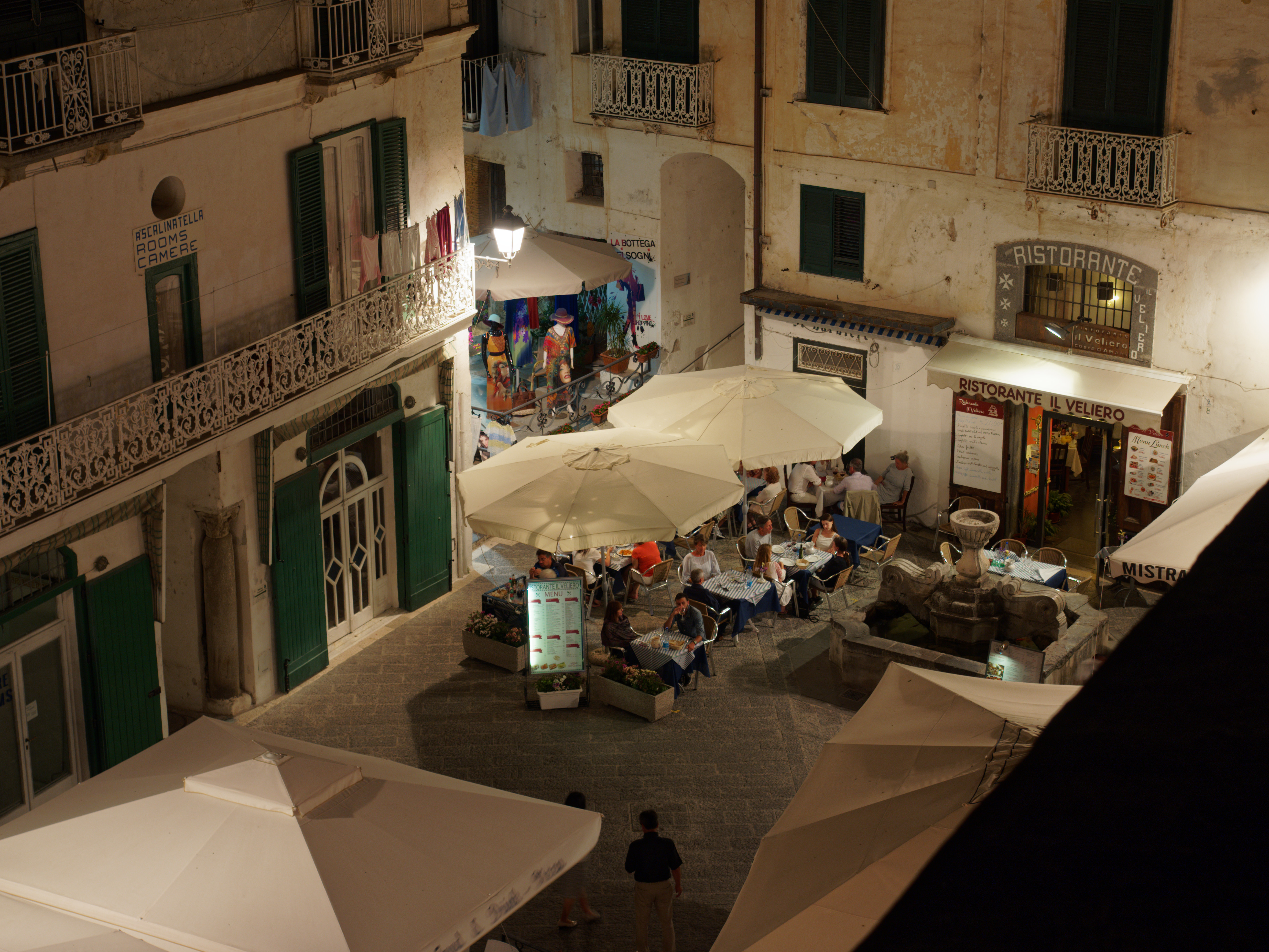 Der Platz Piazza Umberto I. unterhalb und hinter den Bögen der Amalfitana in Atrani, Kampanien, Italien.